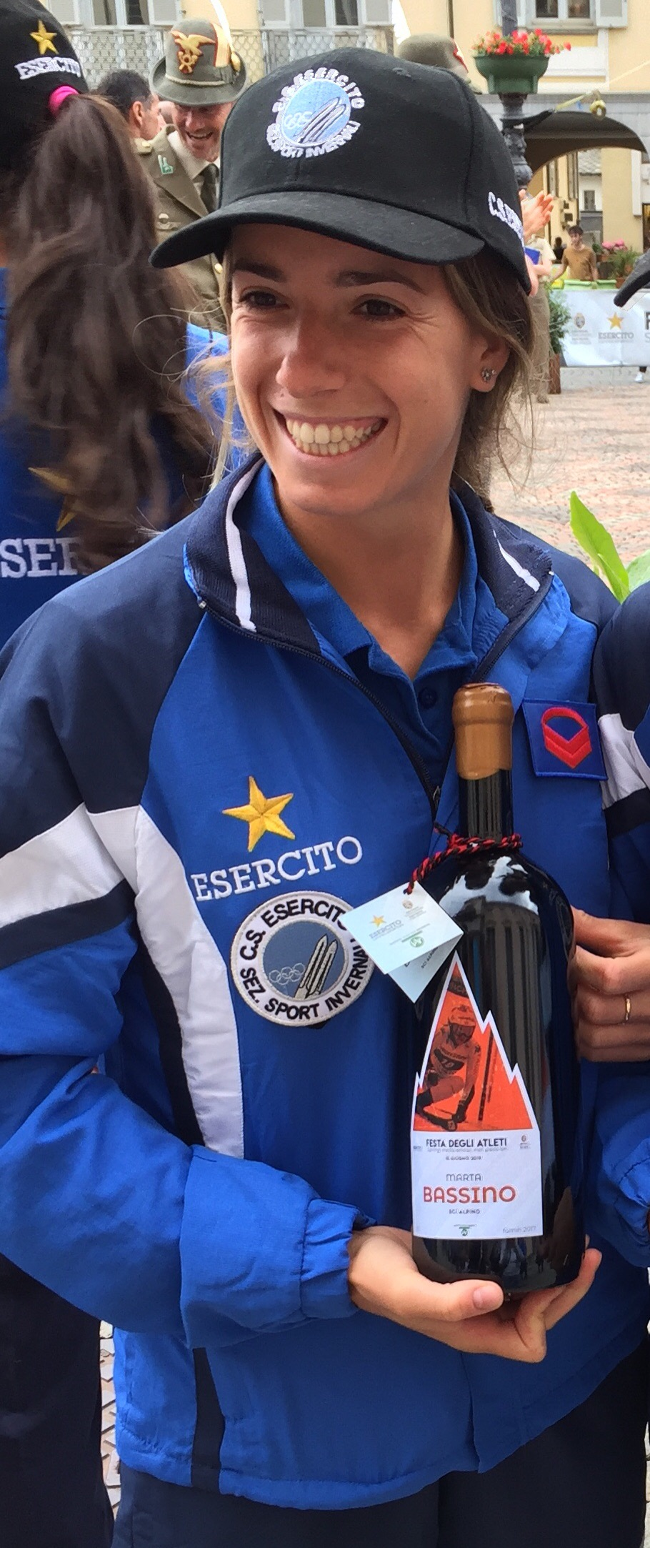 La sciatrice italiana Marta Bassino alla Festa degli atleti del CS Esercito ad Aosta